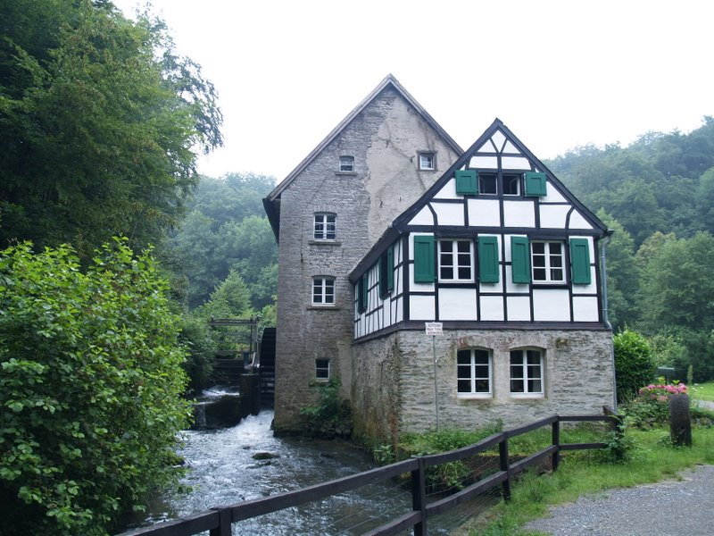 Denkmalgeschützte Winkelsmühle an der Düssel in Mettmann, gelegen im Naturschutzgebiet „Neandertal“